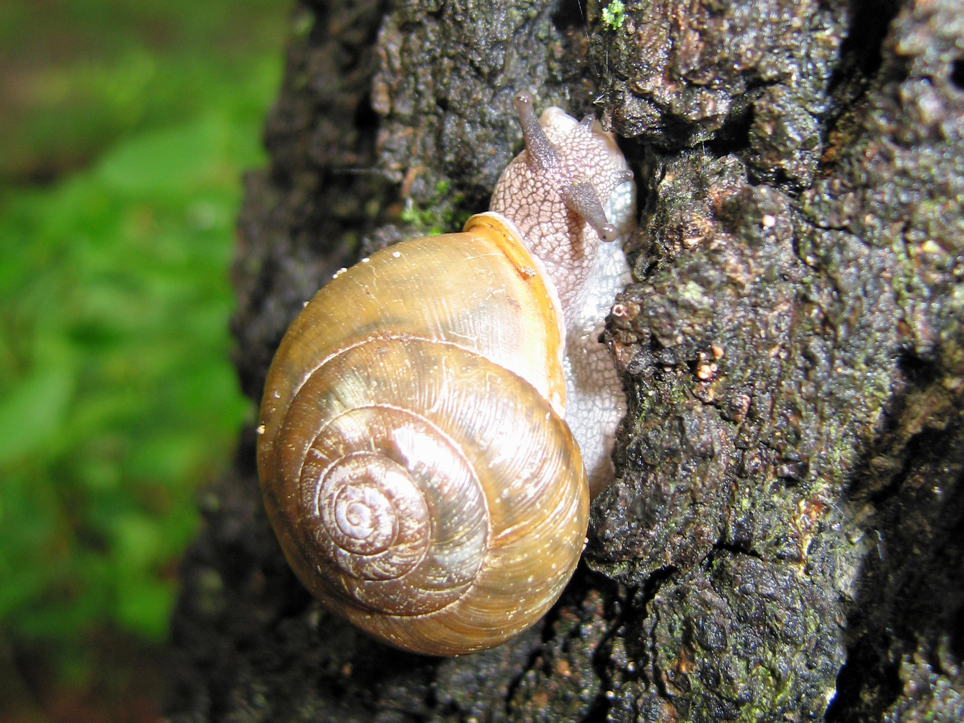 Snail